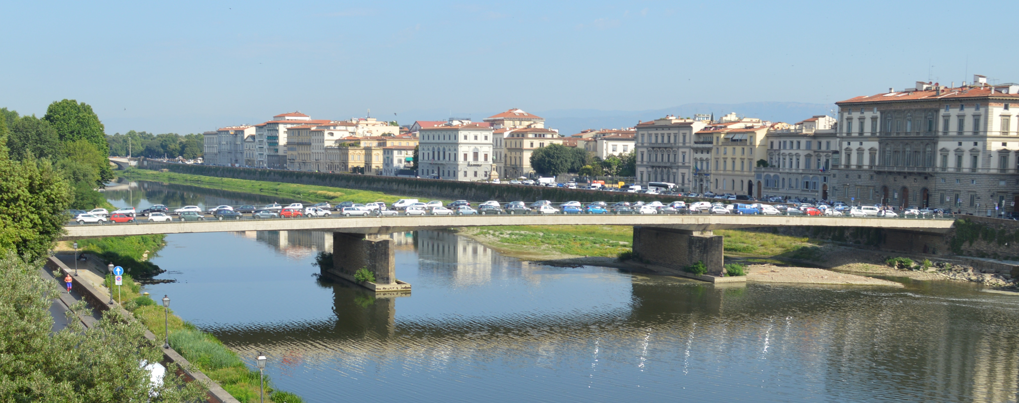 Veduta da est.